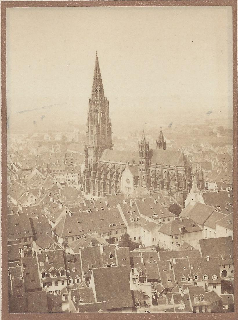 Freiburg im Breisgau, vom Schlossberg aus gesehen. Scan einer Aufnahme von G. Th. Hase 1868 für die zweite Ausgabe von Carl Wilhelm Schnars Schwarzwaldführer in der Wagner'schen Universitätsbuchhandlung.